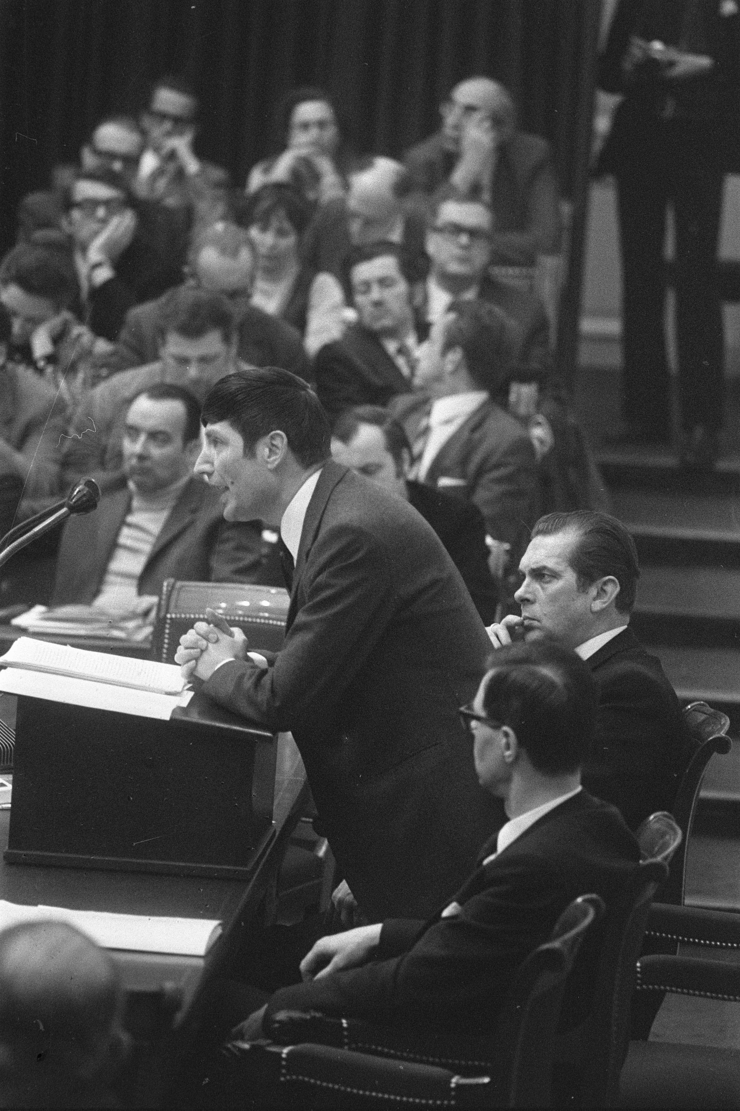 Collectie / Archief : Fotocollectie Anefo Reportage / Serie : [ onbekend ] Beschrijving : Kamerdebat over de vrijlating van de Drie van Breda; minister van Justitie Van Agt aan het woord in de Tweede Kamer in Den Haag Datum : 29 februari 1972 Locatie : Den Haag, Zuid-Holland Trefwoorden : ministers, parlementaire debatten, vrijlatingen Persoonsnaam : Agt, Dries van Fotograaf : Verhoeff, Bert / Anefo Auteursrechthebbende : Nationaal Archief Materiaalsoort : Negatief (zwart/wit) Nummer archiefinventaris : bekijk toegang 2.24.01.05 Bestanddeelnummer : 925-4217